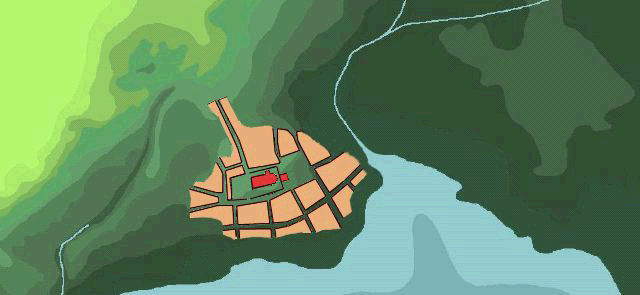 Rekonstruerad karta över Ystad på 1200-talet.